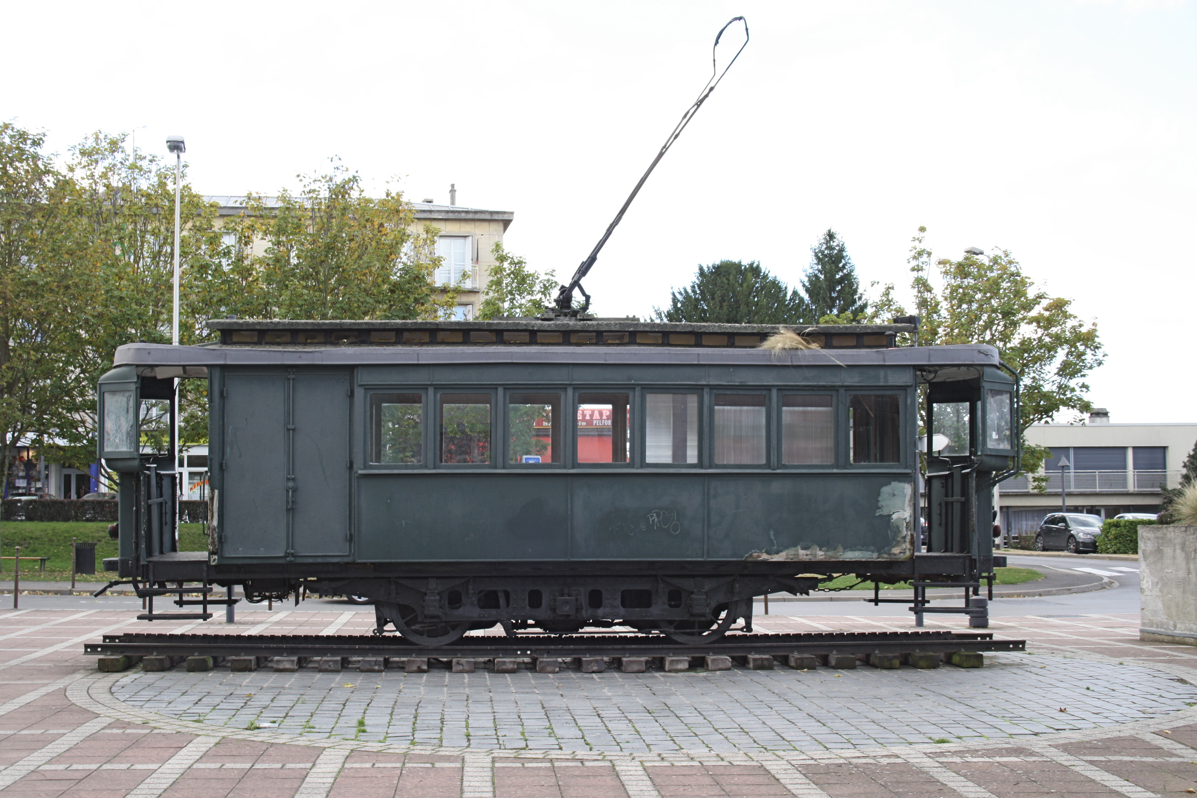 Motrice à crémaillère de l'ancien tramway de Laon